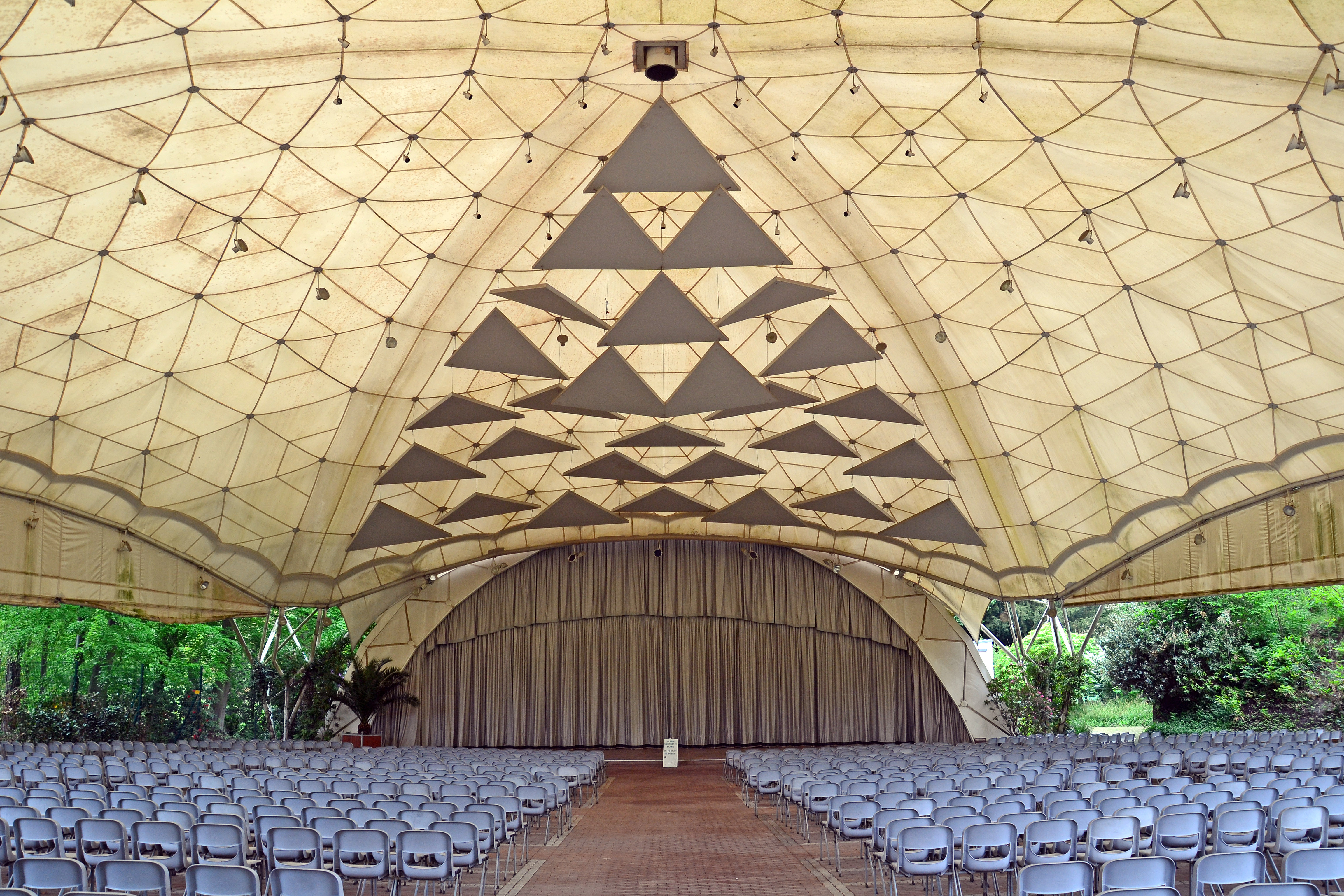 Musikpavillon im Grugapark in Essen